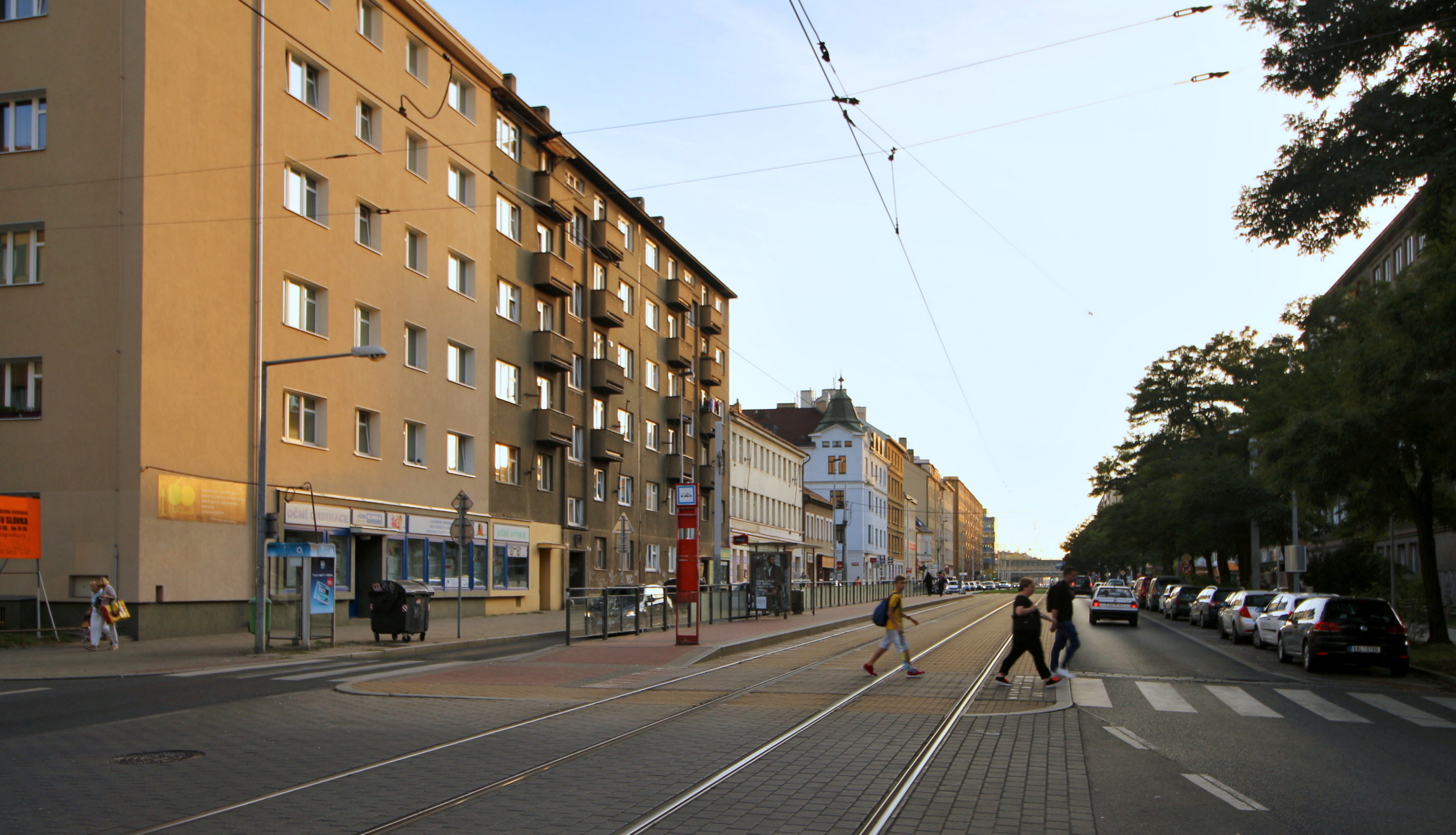 Praha 9-Libeň, Sokolovská ulice